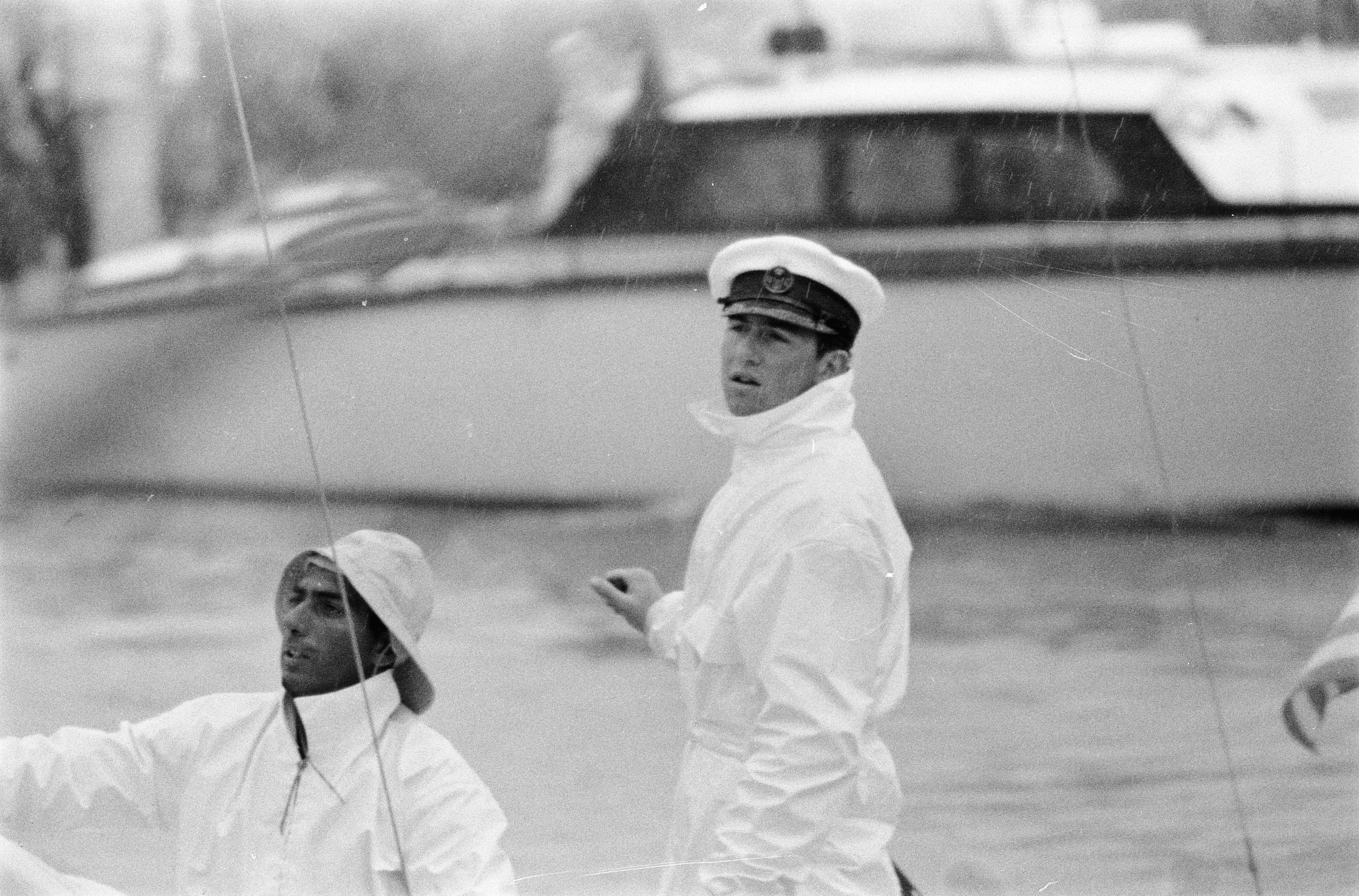 Collectie / Archief : Fotocollectie Anefo Reportage / Serie : [ onbekend ] Beschrijving : Zeilwedstrijden op het IJsselmeer om Drakencup 1960 Zijne Koninklijke Hoogheid Prins Constantijn van Griekenland Datum : 5 juli 1960 Locatie : Griekenland, IJsselmeer Trefwoorden : ZEILWEDSTRIJDEN Persoonsnaam : Prins Constantijn Fotograaf : Bilsen, Joop van / Anefo Auteursrechthebbende : Nationaal Archief Materiaalsoort : Negatief (zwart/wit) Nummer archiefinventaris : bekijk toegang 2.24.01.05 Bestanddeelnummer : 911-3969